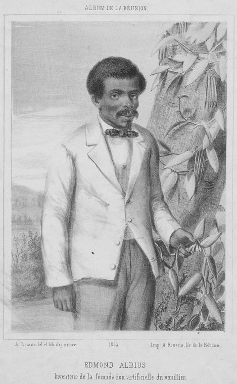 Edmond Albius inventeur de la fécondation artificielle du vanillier.